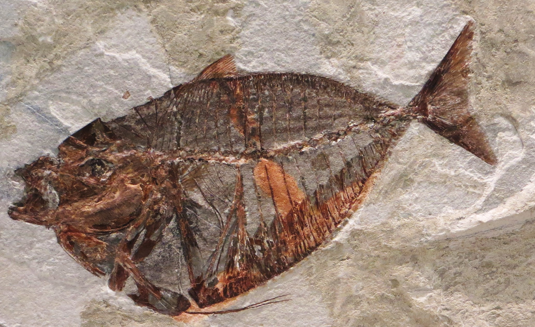 Fossil of Mene, an extinct fish- Took the picture at Museo di Arsago Seprio